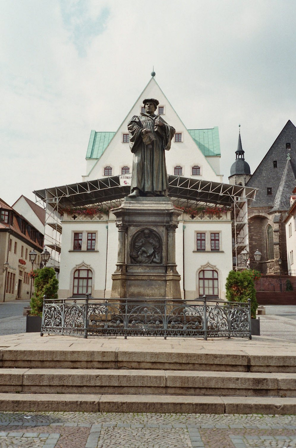 Denkmal für Martin Luther von Rudolf Siemering in Eisleben, Deutschland